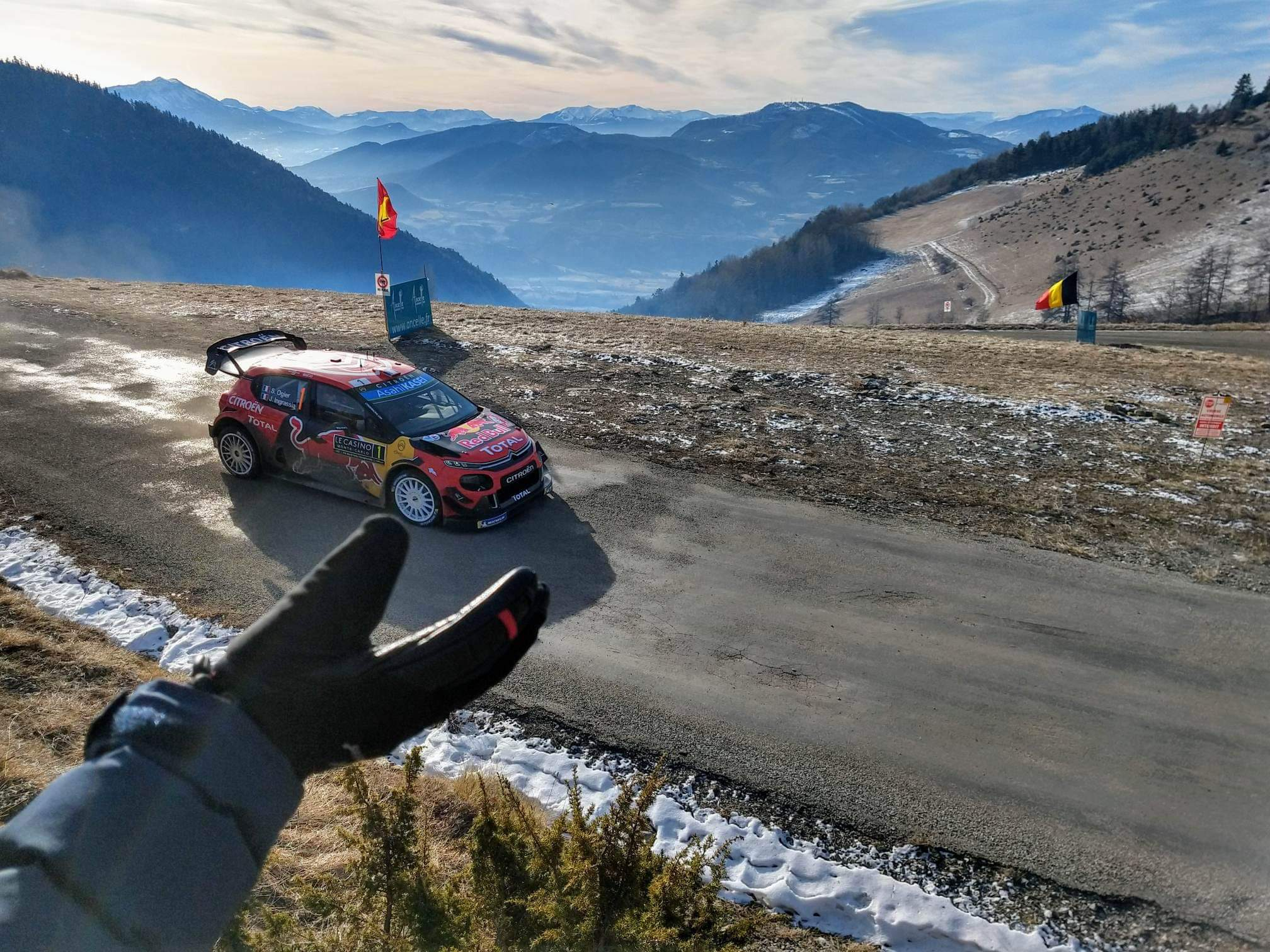 Citroën C3 WRC de Sébastien Ogier au Col de Moissière (05), lors du rallye Monte-Carlo 2019.